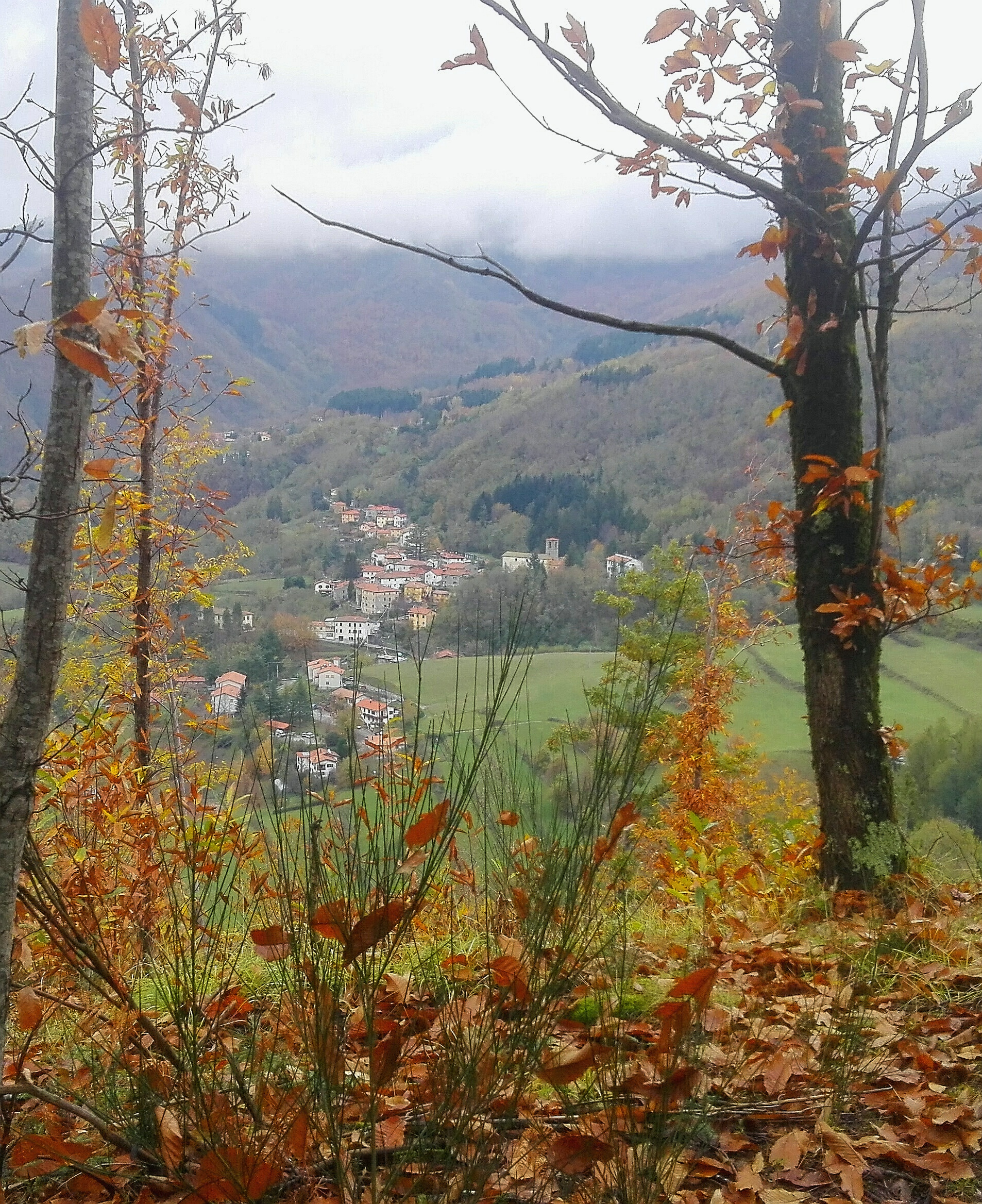 Lizzano P.se vista da Monte Castello